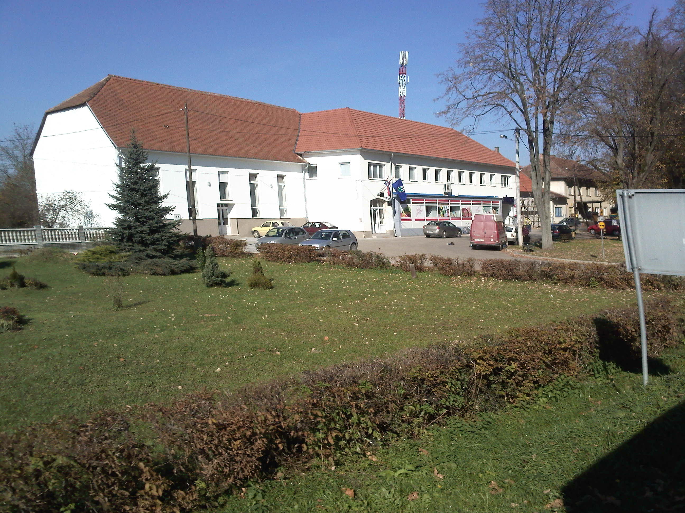 Drnje, Croatia